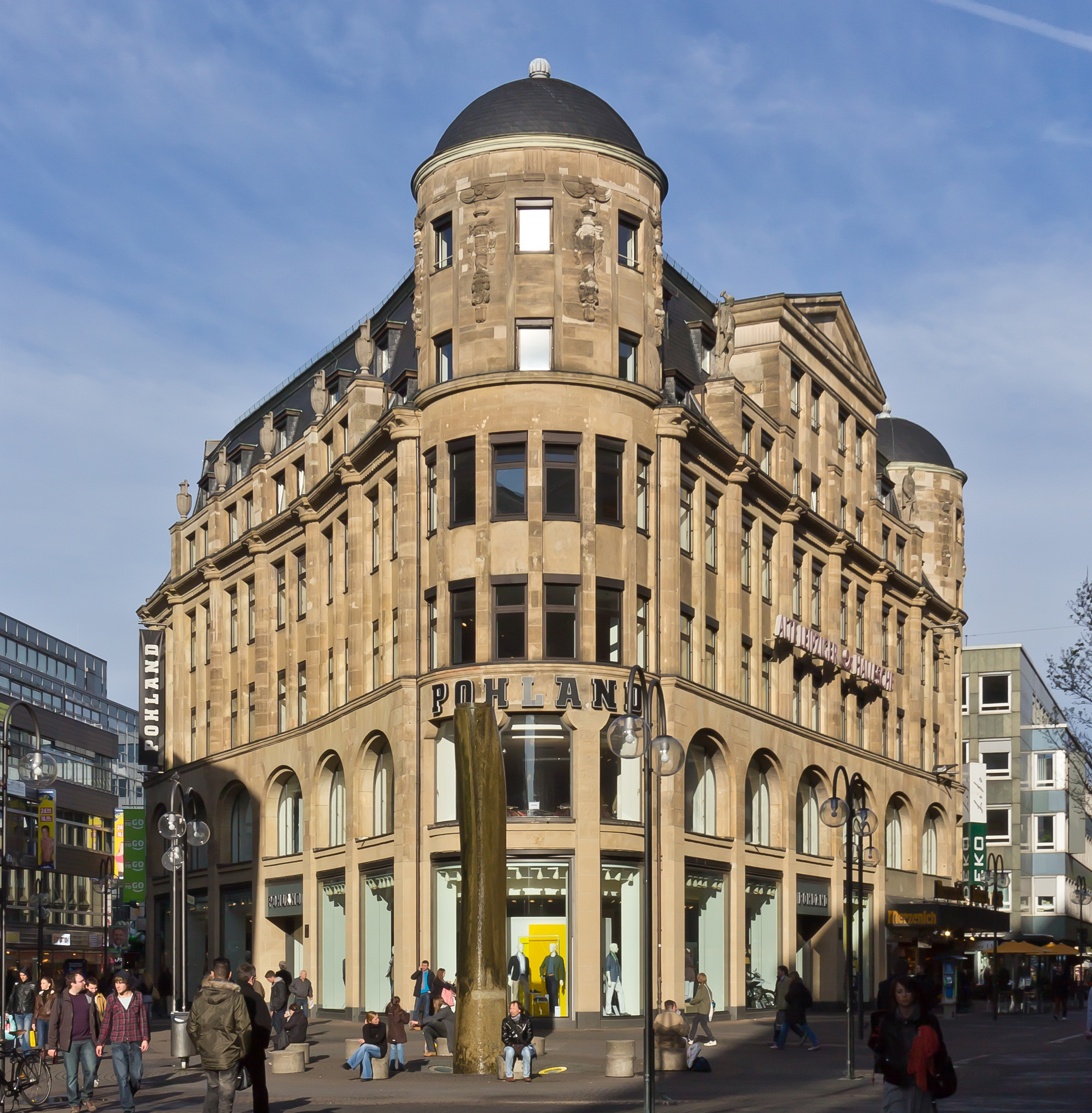 Denkmalgeschütztes Geschäftshaus "Palatium", Gürzenichstr. 1-5/Schildergasse 1-5